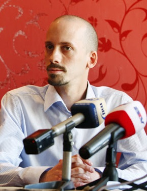 Istvánffy András, a 4K! elnöke